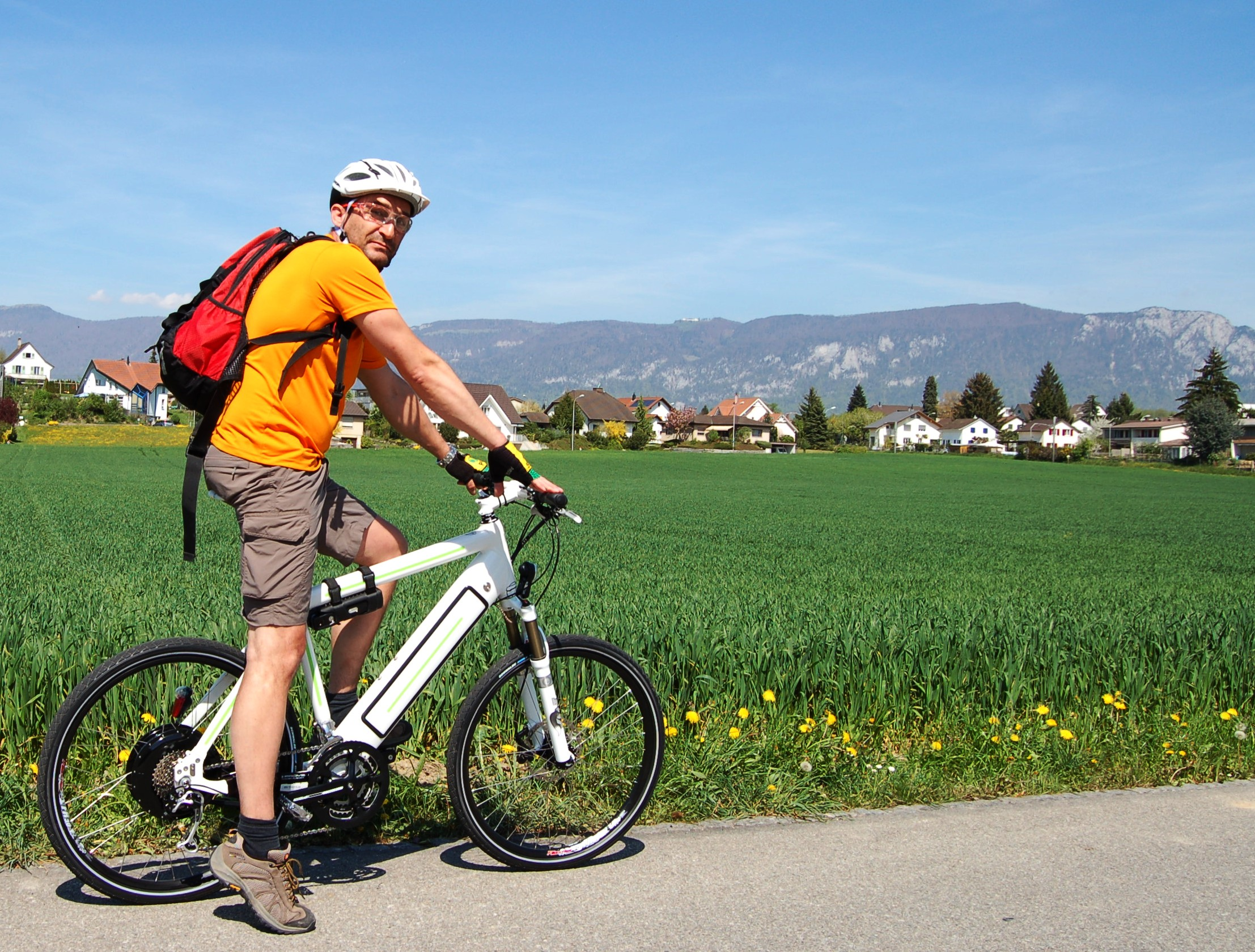 Pedelec der Marke Stromer in Biberist mit Stapfacker und Jura im Hintergrund